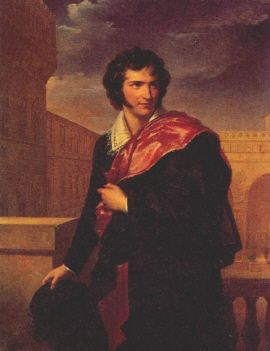 Italian poet Tommaso Sgricci (1789-1836)